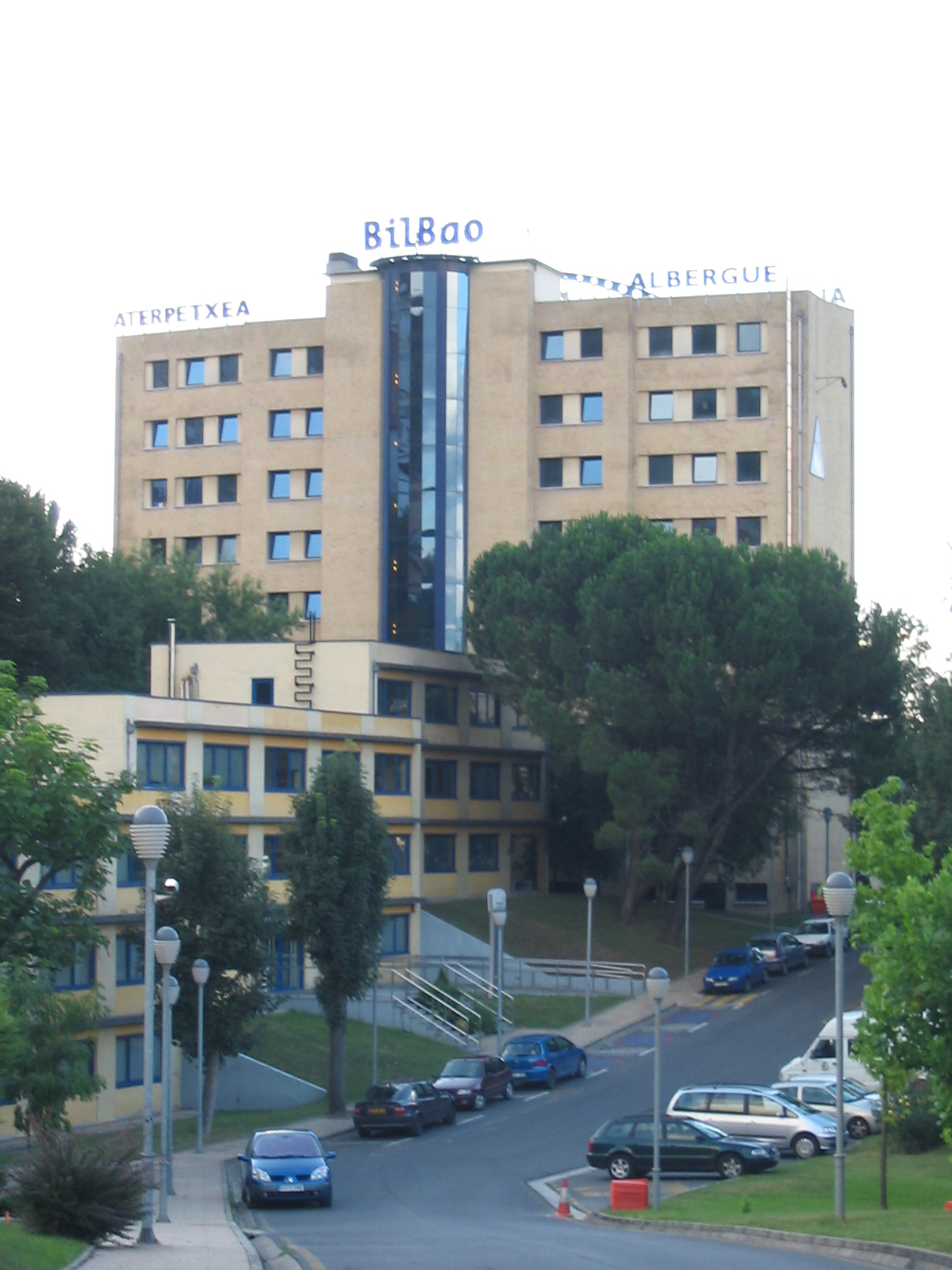 Auberge de jeunesse de Bilbao (Pays basque, Espagne). Je suis l'auteur du cliché pris en août 2006.